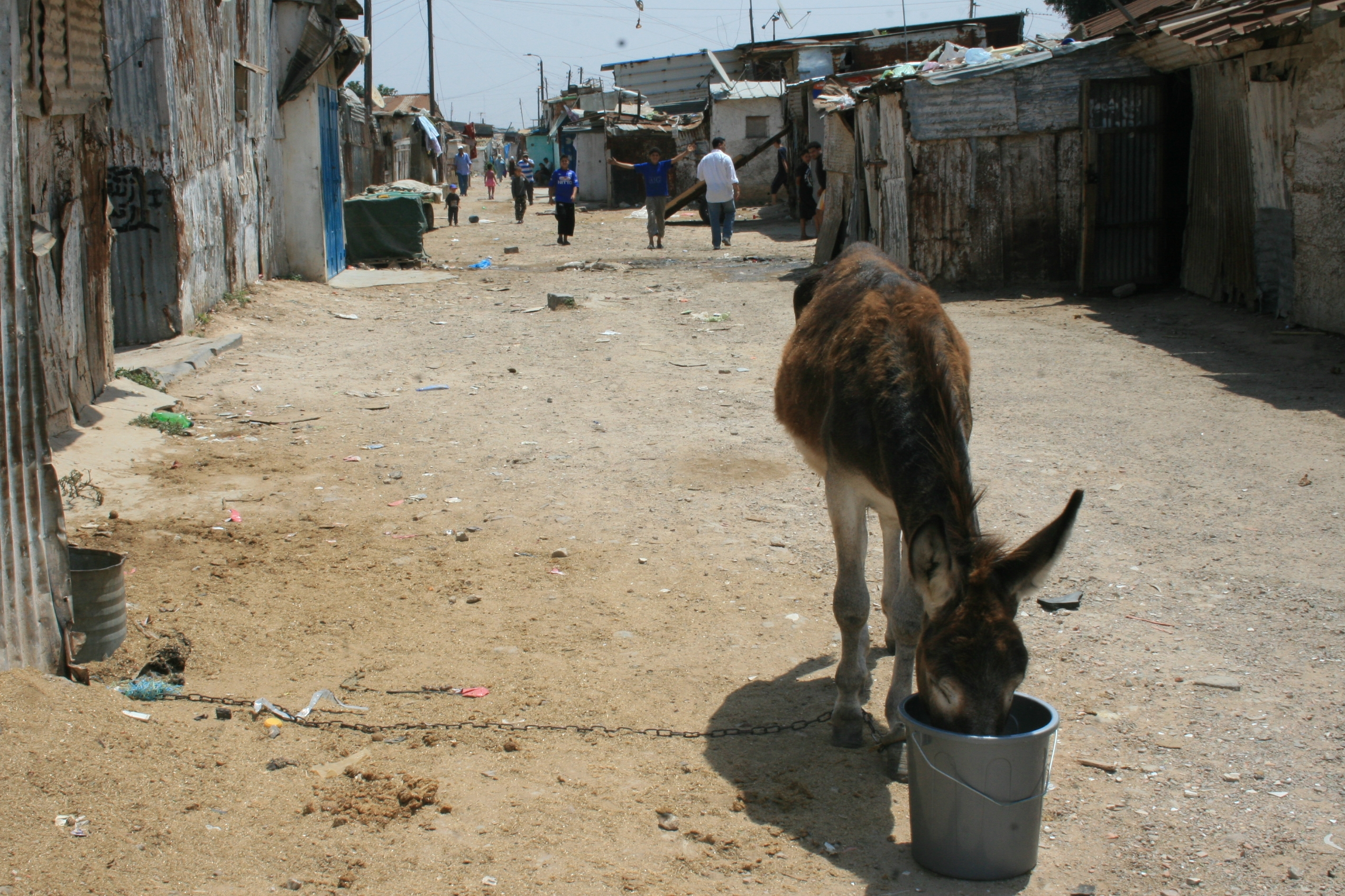 Morocco is committed to cleaning up slums by 2020, such as this one in Casablanca. المغرب ملتزم بإزالة المناطق العشوائية مثل هذا الحي في مدينة الدارالبيضاء قبل عام 2020. Le Maroc s'est engagé à éradiquer les bidonvilles, comme celui-ci, situé à Casablanca, à l'horizon 2020.